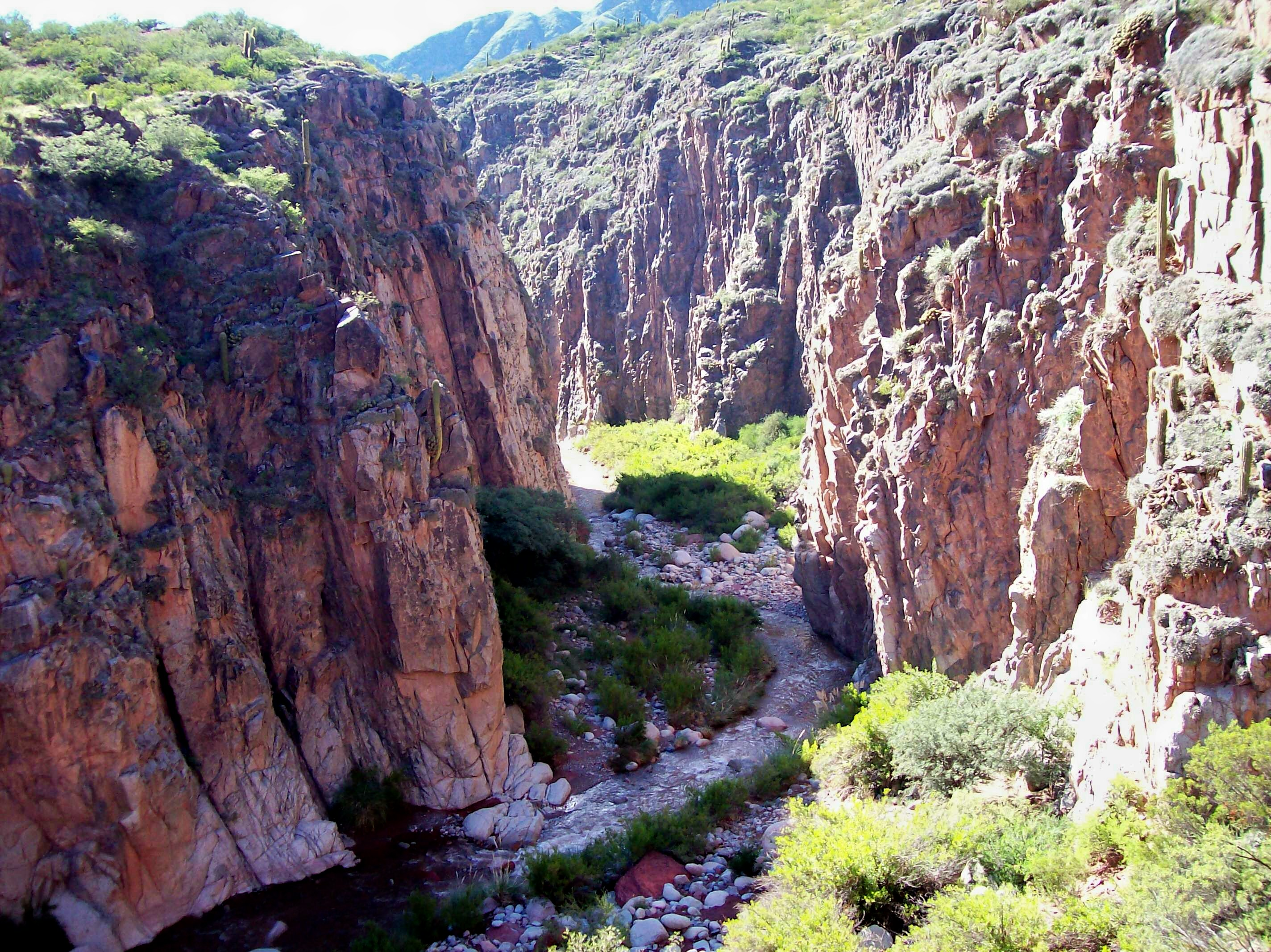 Río Miranda, en el Departamento Chilecito en la provincia de La Rioja, Argentina.